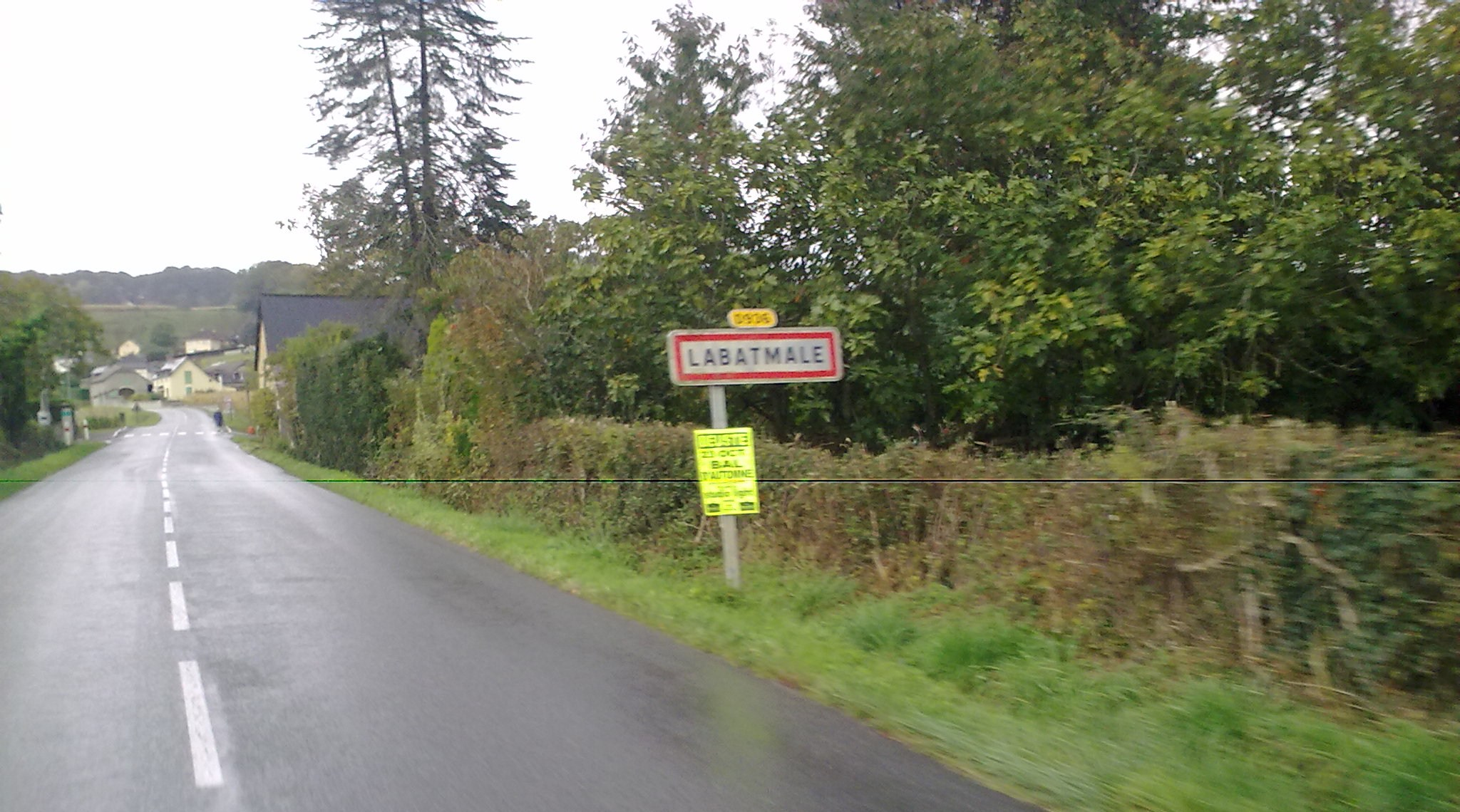 Entrée dans Labatmale